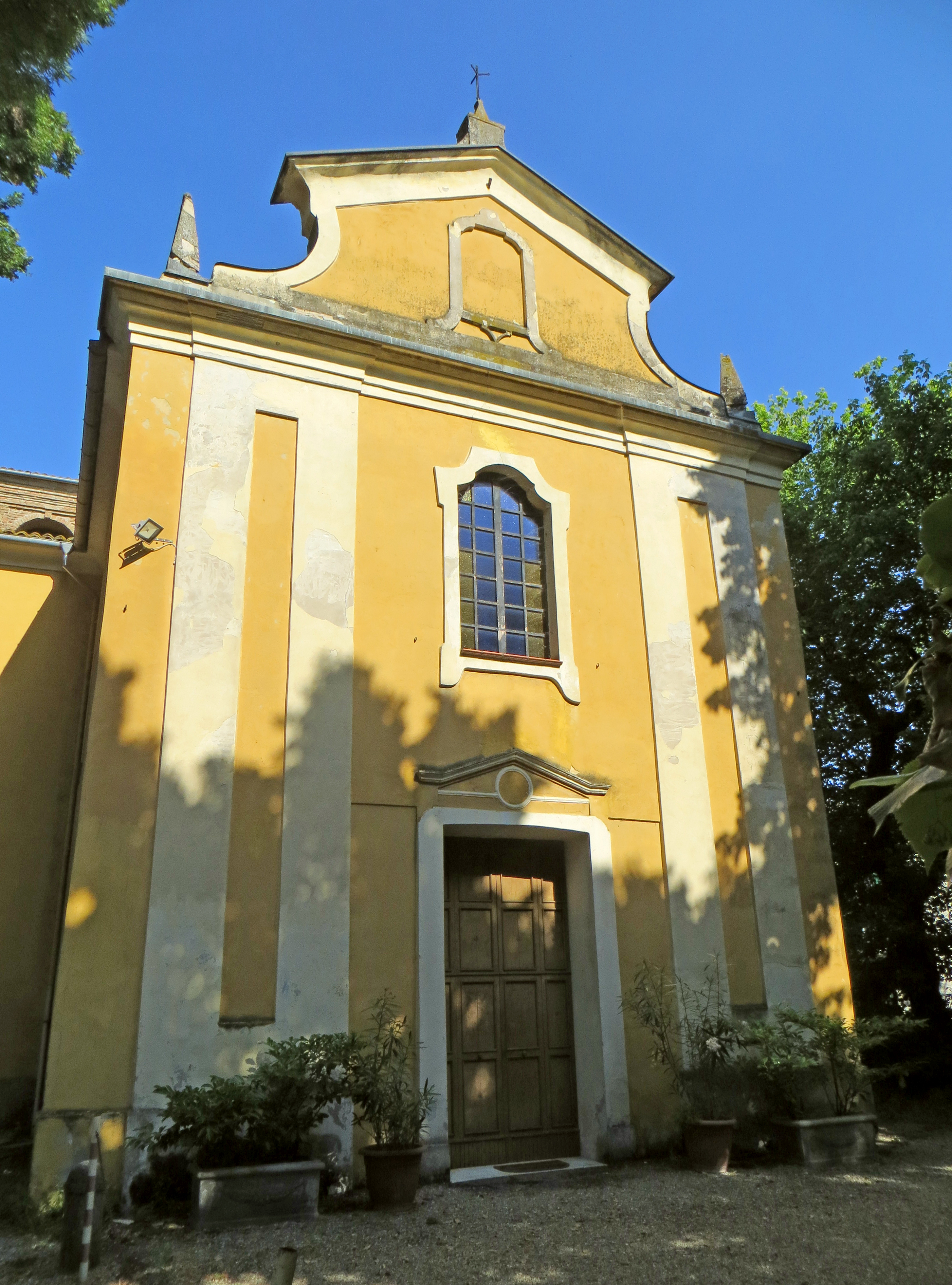 Chiesa di San Giovanni Evangelista (Vigolante, Parma) - facciata